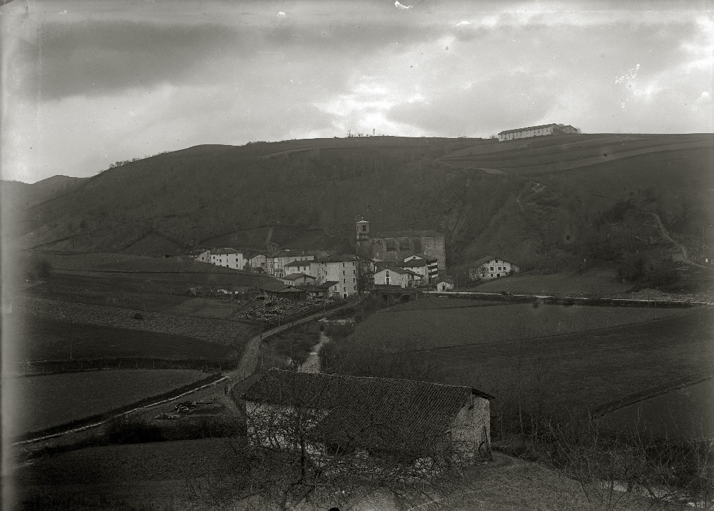 Título original: Vista general de la localidad de Zaldibia (1/1) Localización: Zaldivia (Guipúzcoa)